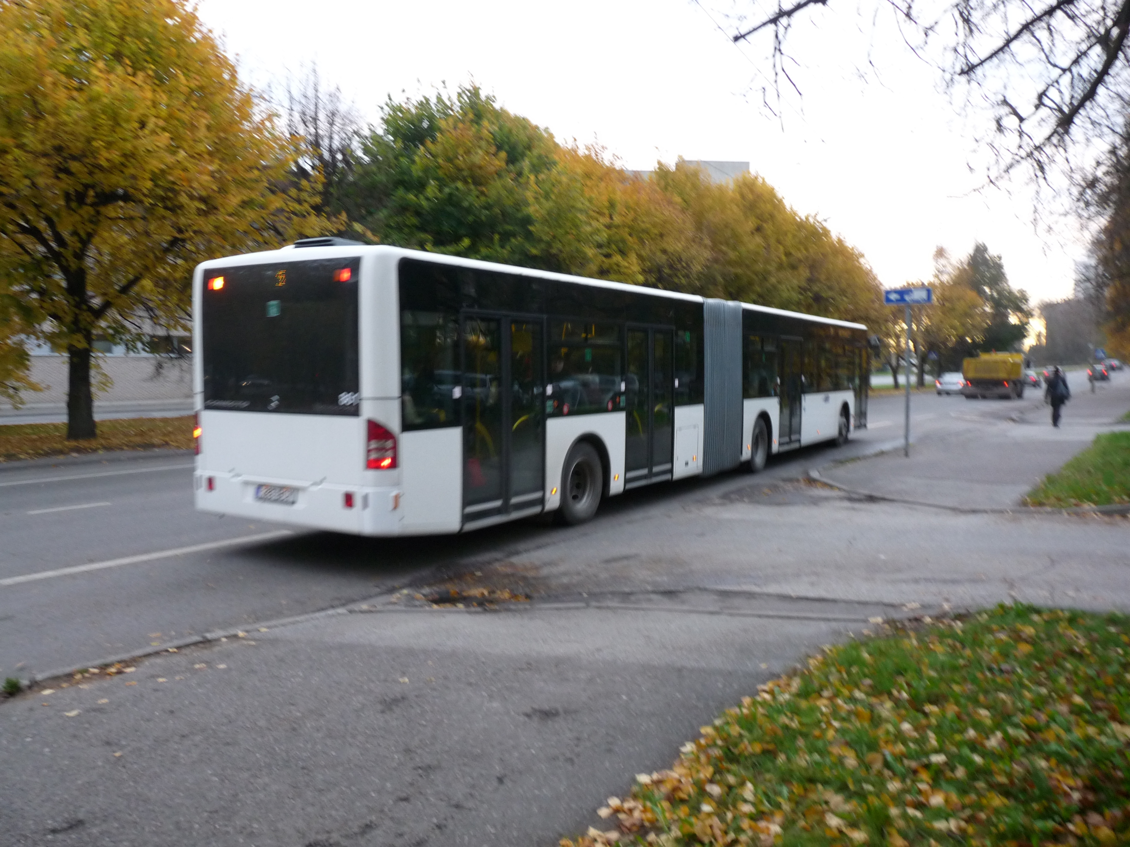 Mercedes-Benz Conecto G lõõtsbuss, mida oktoobrist 2012 katsetab Tartu linnaliinidel AS SEBE. Foto: Oop.